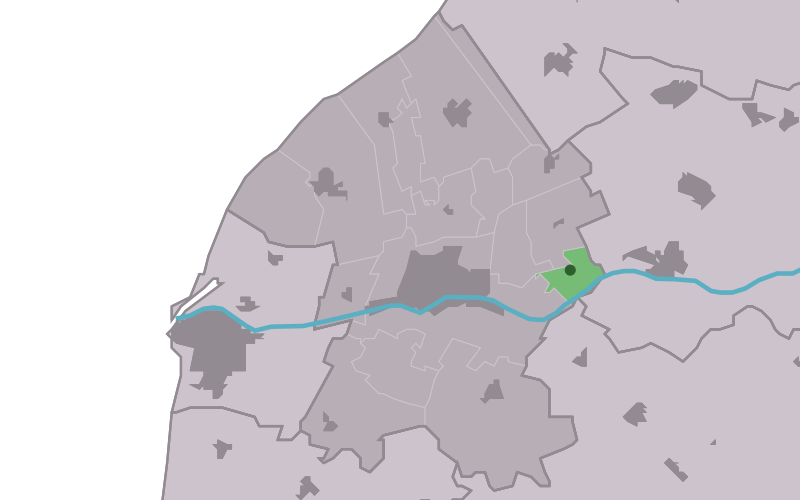 Kaartsje fan himrik fan Sweins